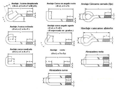 herramientas